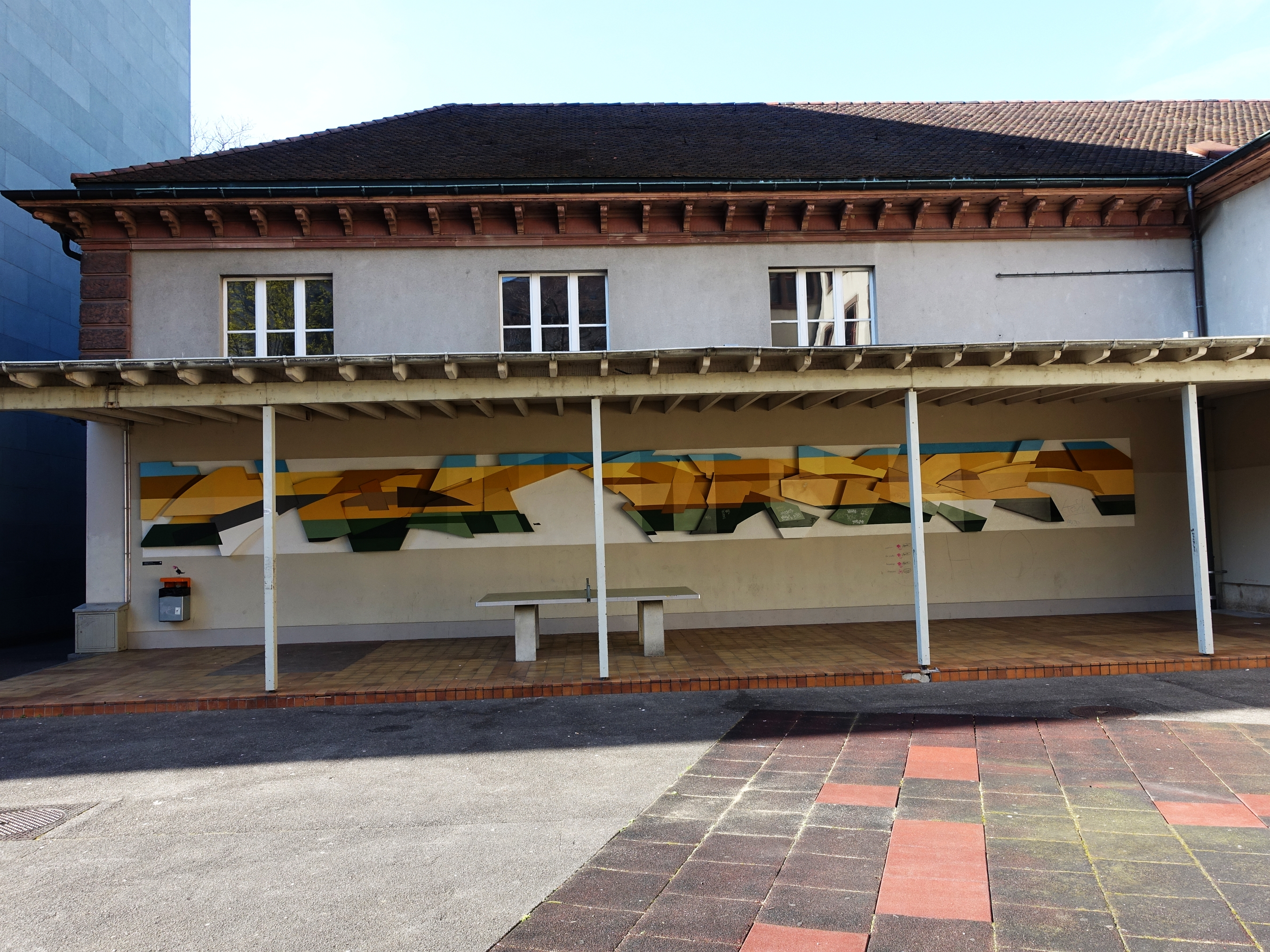 Bemaltes Holzrelief, (Querschnitt durch die Tektonik einer Juralandschaft), 1976. Von Konrad Hofer (1928–2006) Maler, Bildhauer. Pestalozzischule, St. Johannplatz 9